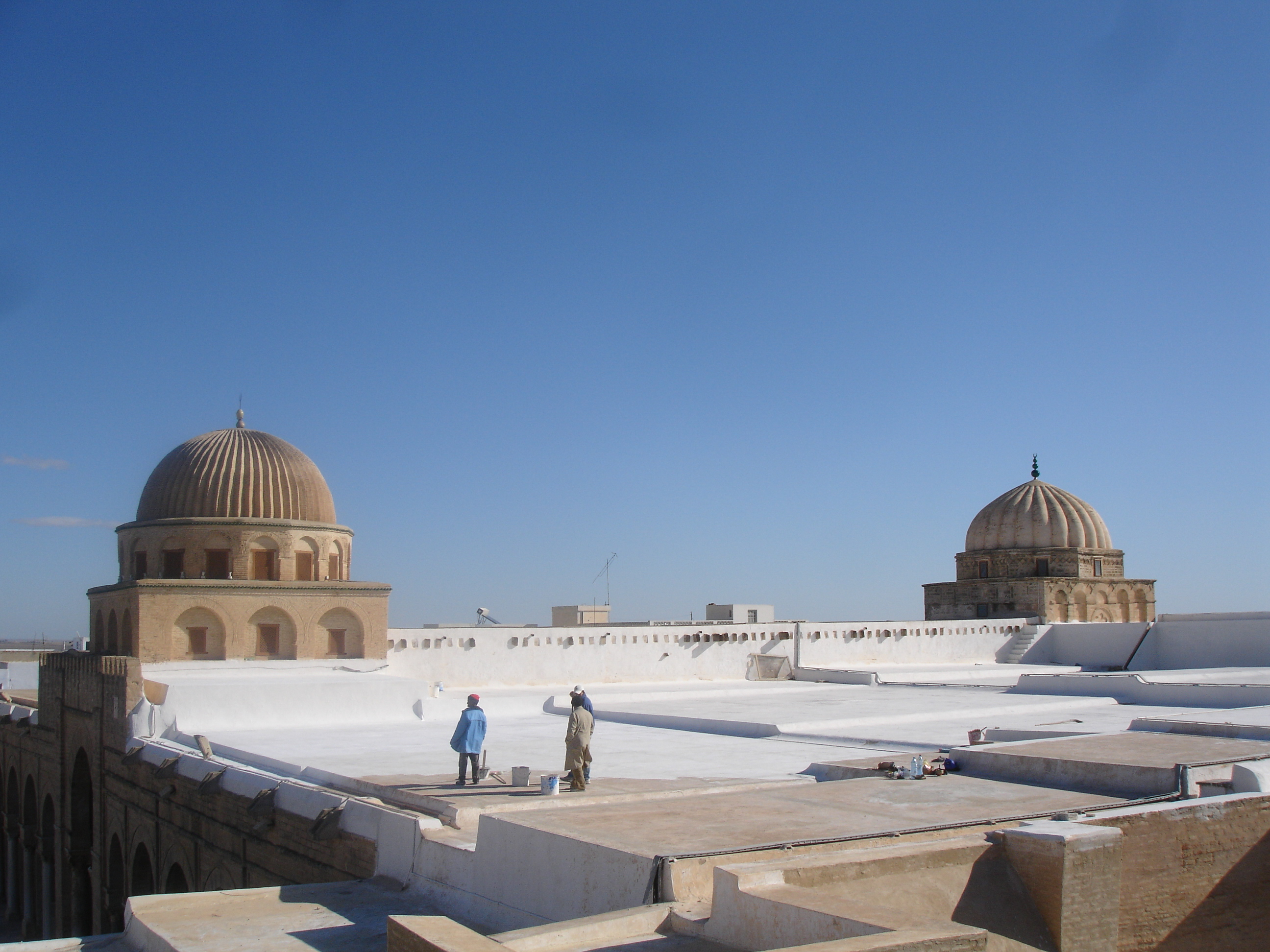 Toit en terrasse et coupoles de la salle de prière de la Grande Mosquée de Kairouan, en Tunisie.